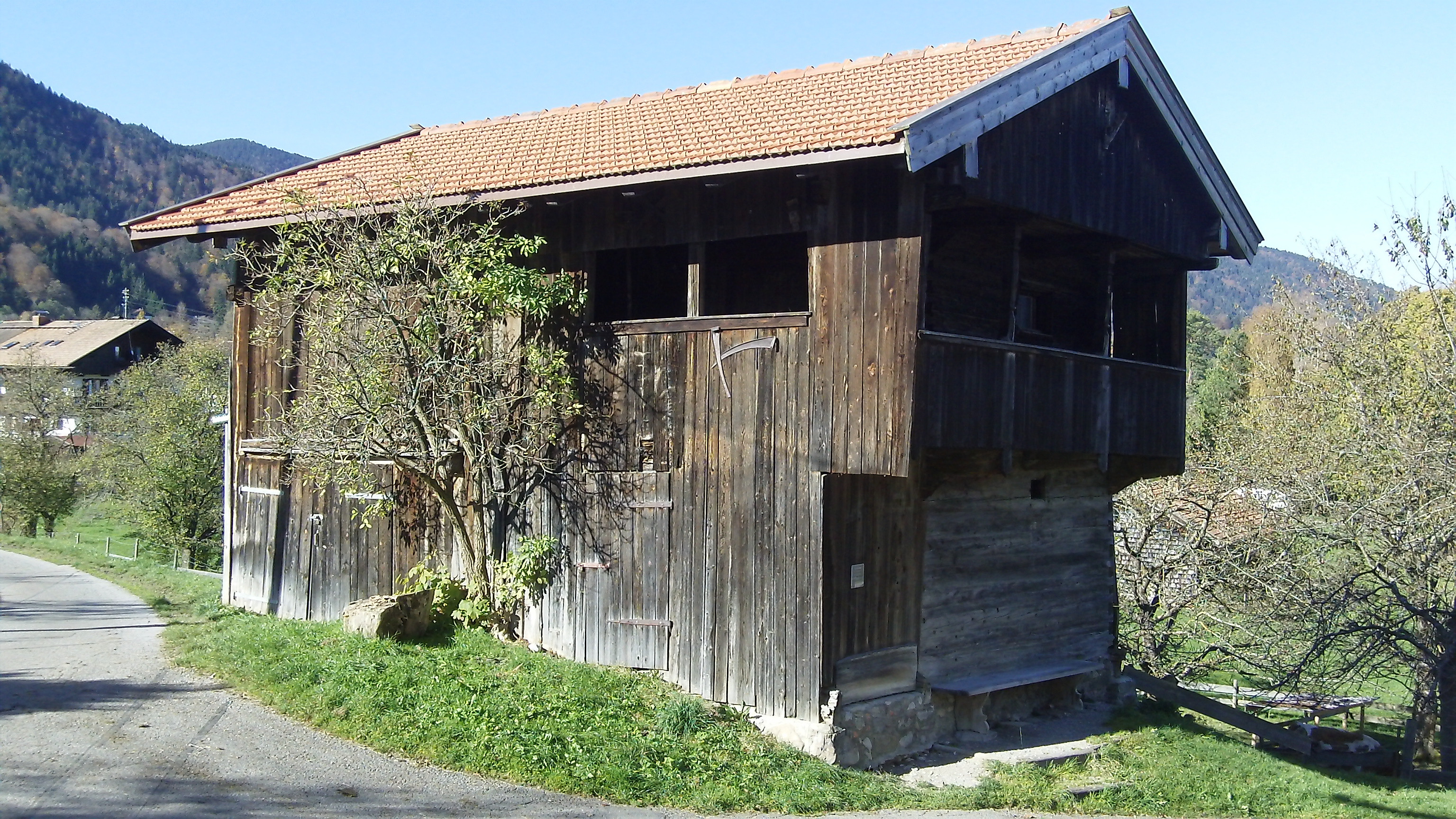 Ehemaliger Getreidekasten, zweigeschossiger Flachsatteldach-Blockbau mit Laube, 1647/48 (dendro. Dat.)This is a photograph of an architectural monument.